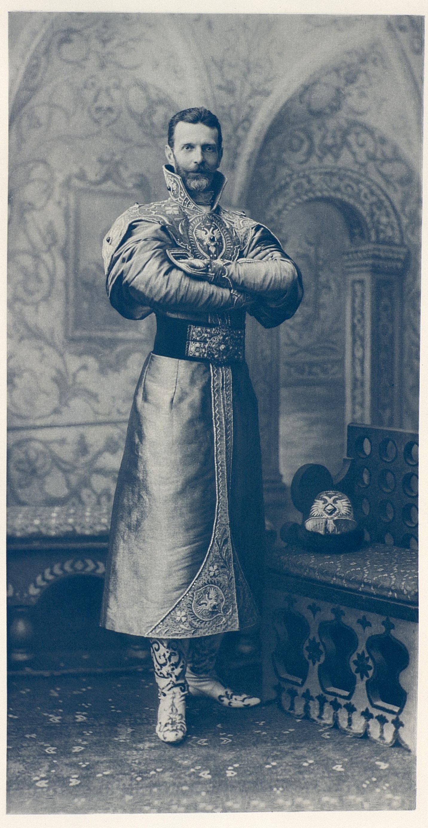 Grand Duke Sergei Alexandrovich of Russia // Великий князь Сергей Александрович в княжеском наряде